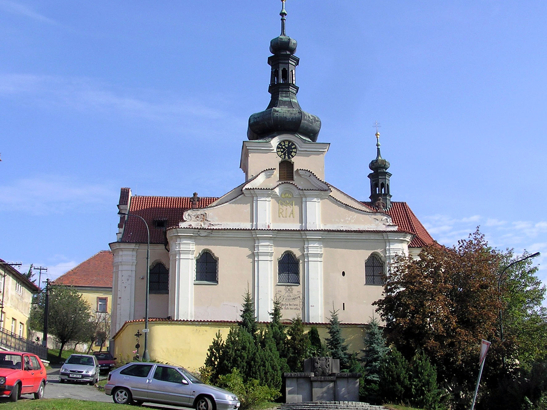 Kostel Narození Panny Marie - Mnichovice (okr. Praha-východ)